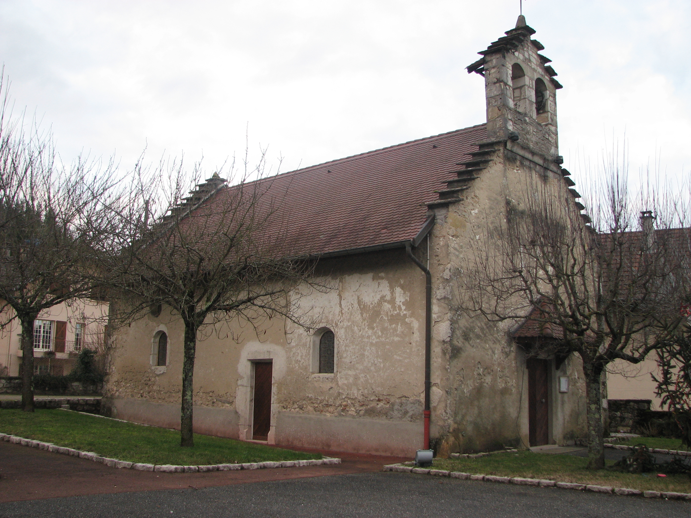 Église de Peyzieu (Arbignieu, 01)